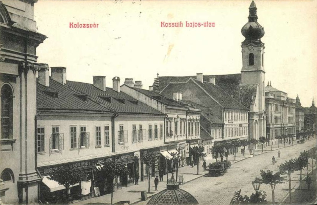 Kolozsvári Kossuth Lajos utca régi képeslapon